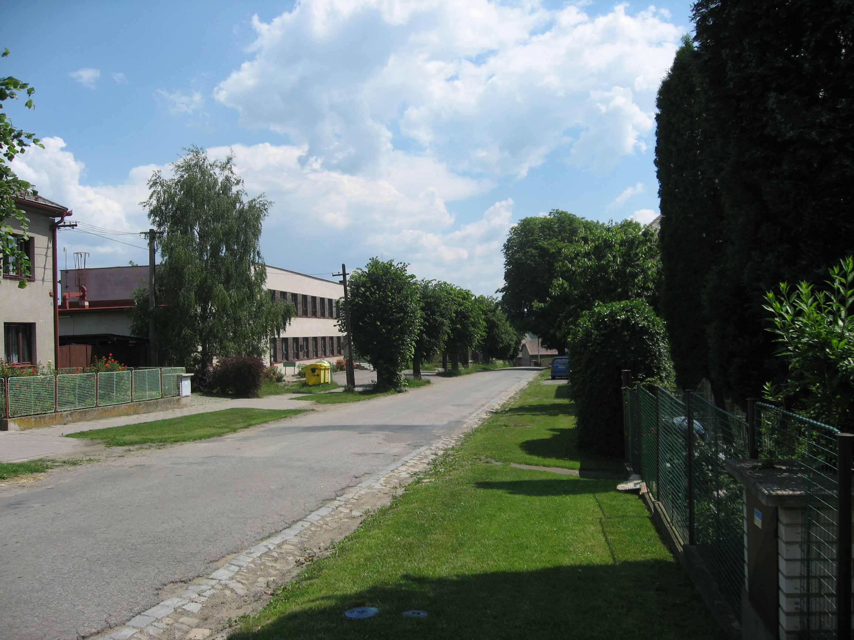 Lípa, okres Havlíčkův Brod